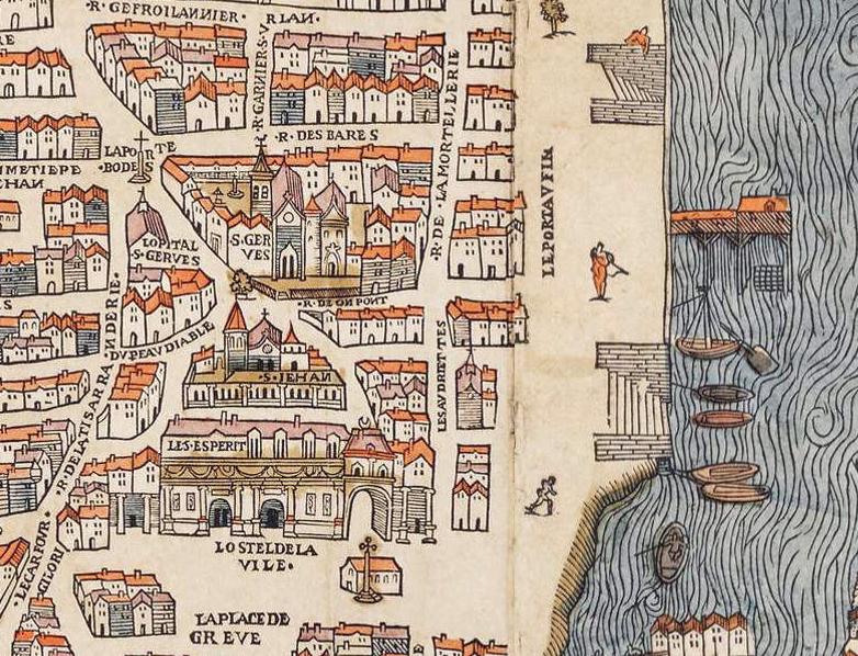 Rue des Barres dans son environnement.